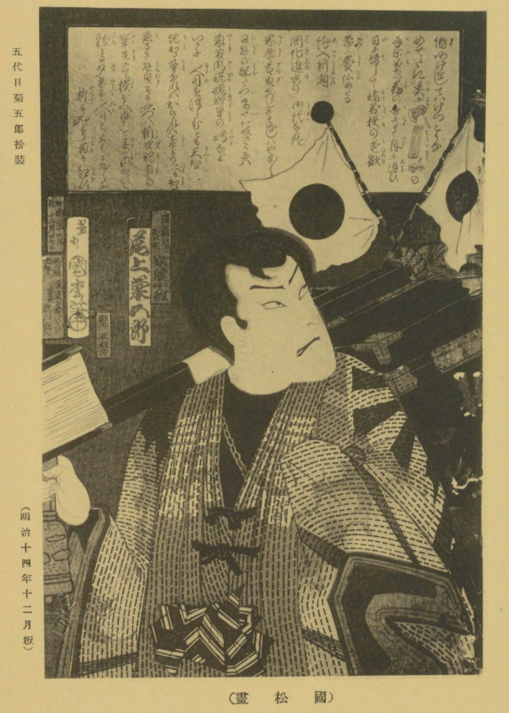 五代尾上菊五郎の扮する新聞売安藤小政（政次郎）。横浜で新聞を販売していた安藤小政の「意気な姿」は東京にも広がり、尾上菊五郎が劇中で彼の紛争をして舞台に上がると、「異常な喝采」が上がったという。